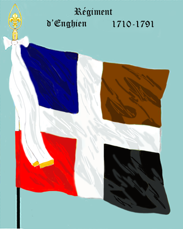 Ordonnanzfahne eines königlich französischen Infanterie-Regiments. - Entnommen und überarbeitet aus: „LES UNIFORMES ET LES DRAPEAUX DE L'ARMÉE DU ROI“ Marseille 1899. (Drapeau d'Ordonnance d' un régiment française d'infanterie royale.)